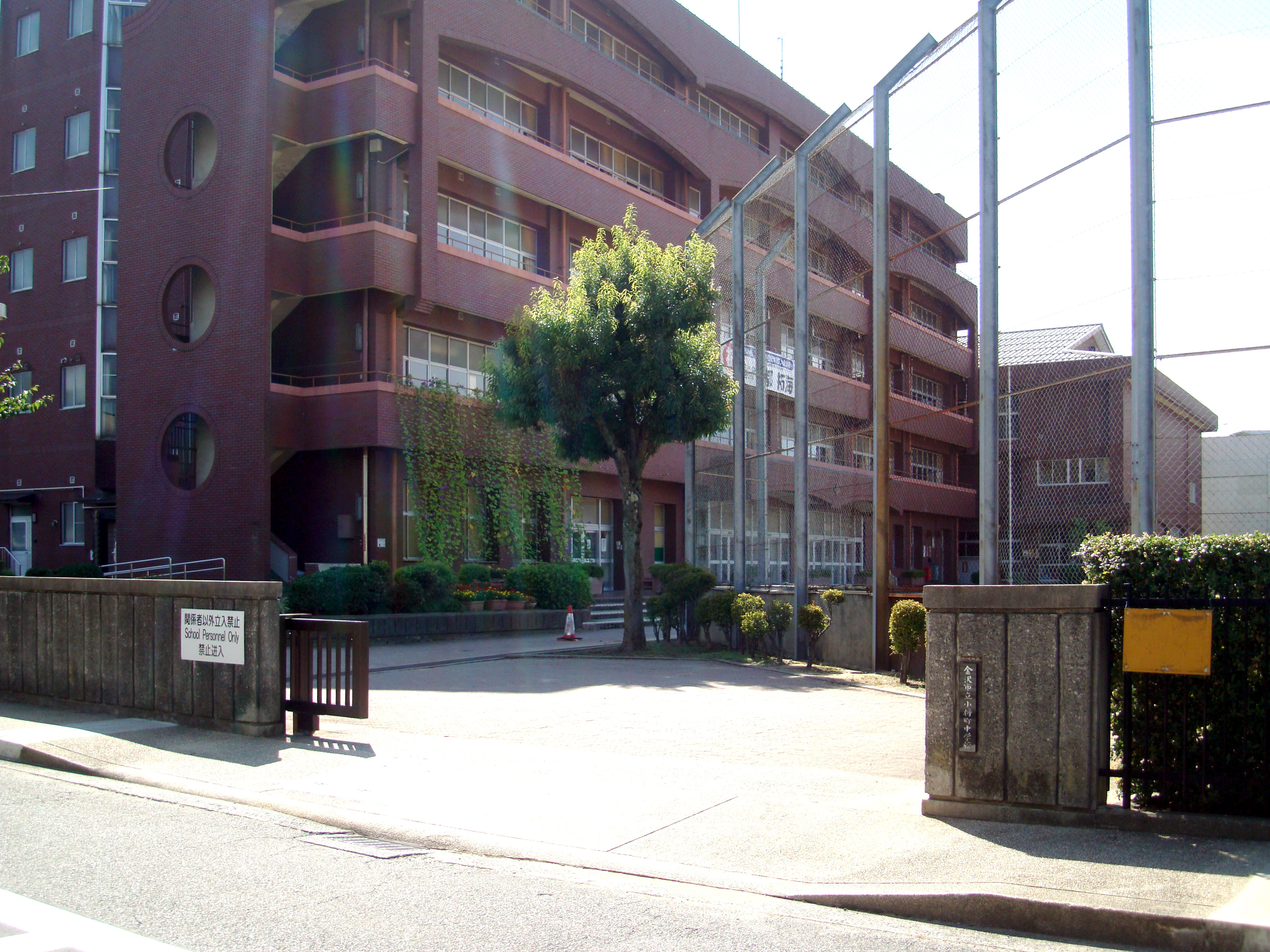 金沢市立小将町中学校